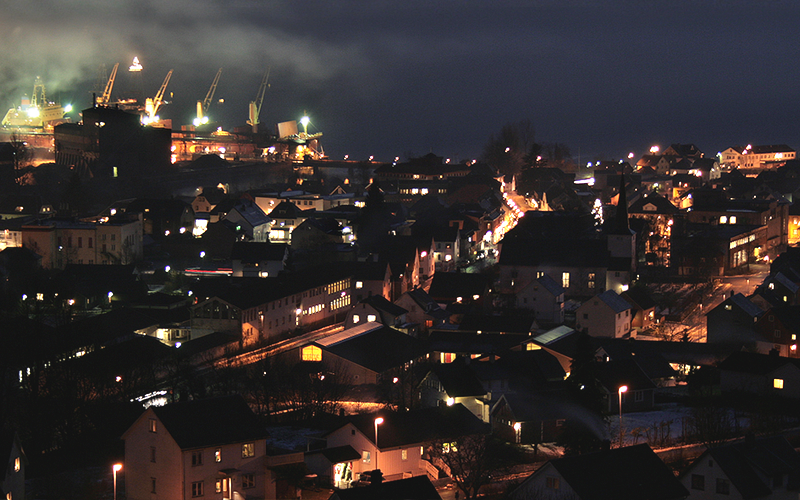 Midten av byen om natta.